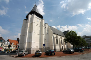 Eglise Saint-Vincent à Marcq-en-Baroeul (59700) Photographie personnelle